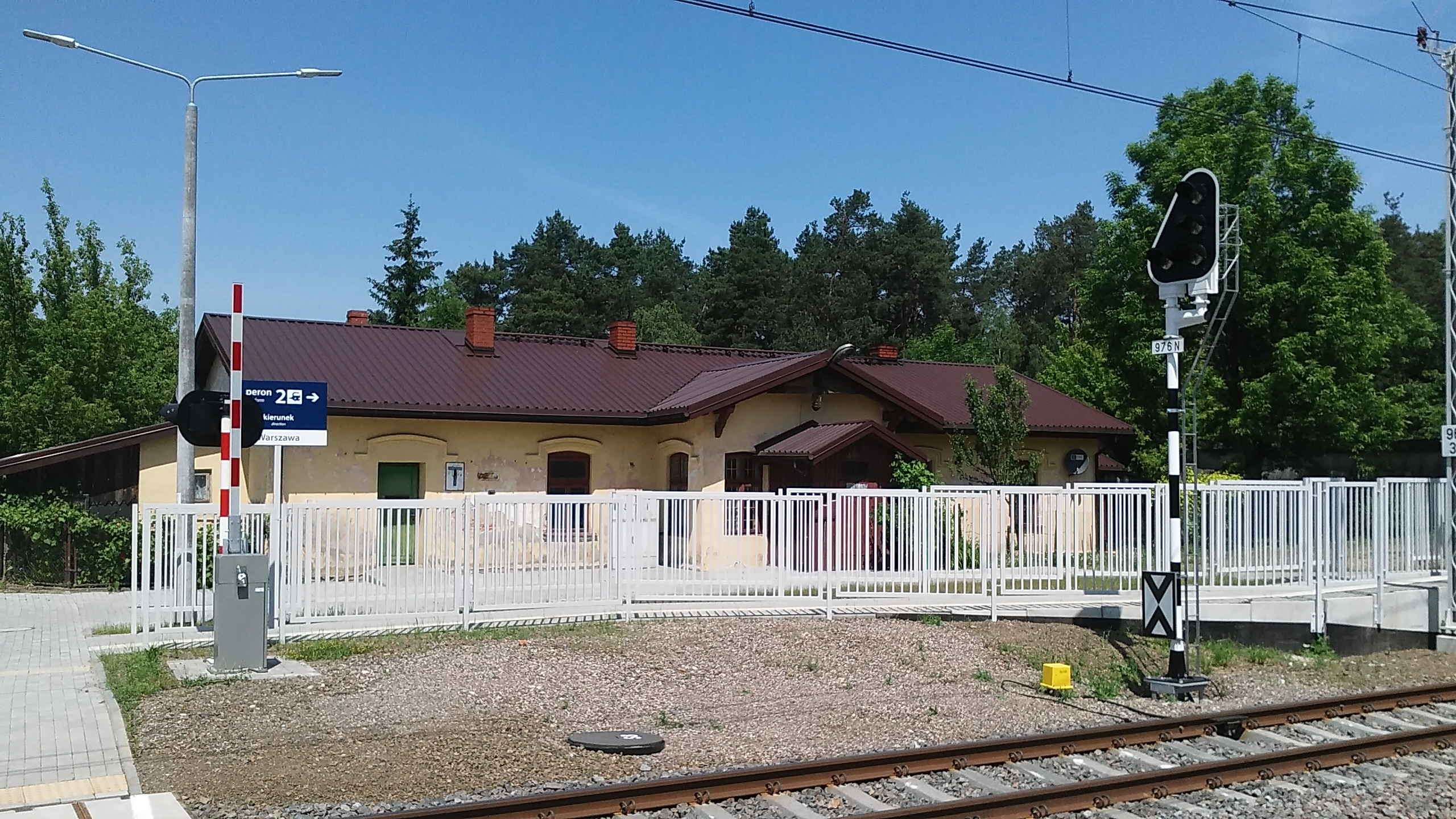 przystanek kolejowy Zaręby Kościelne - dojście do peronu 2 (w kierunku Warszawy) i dawny dworzec kolejowy.